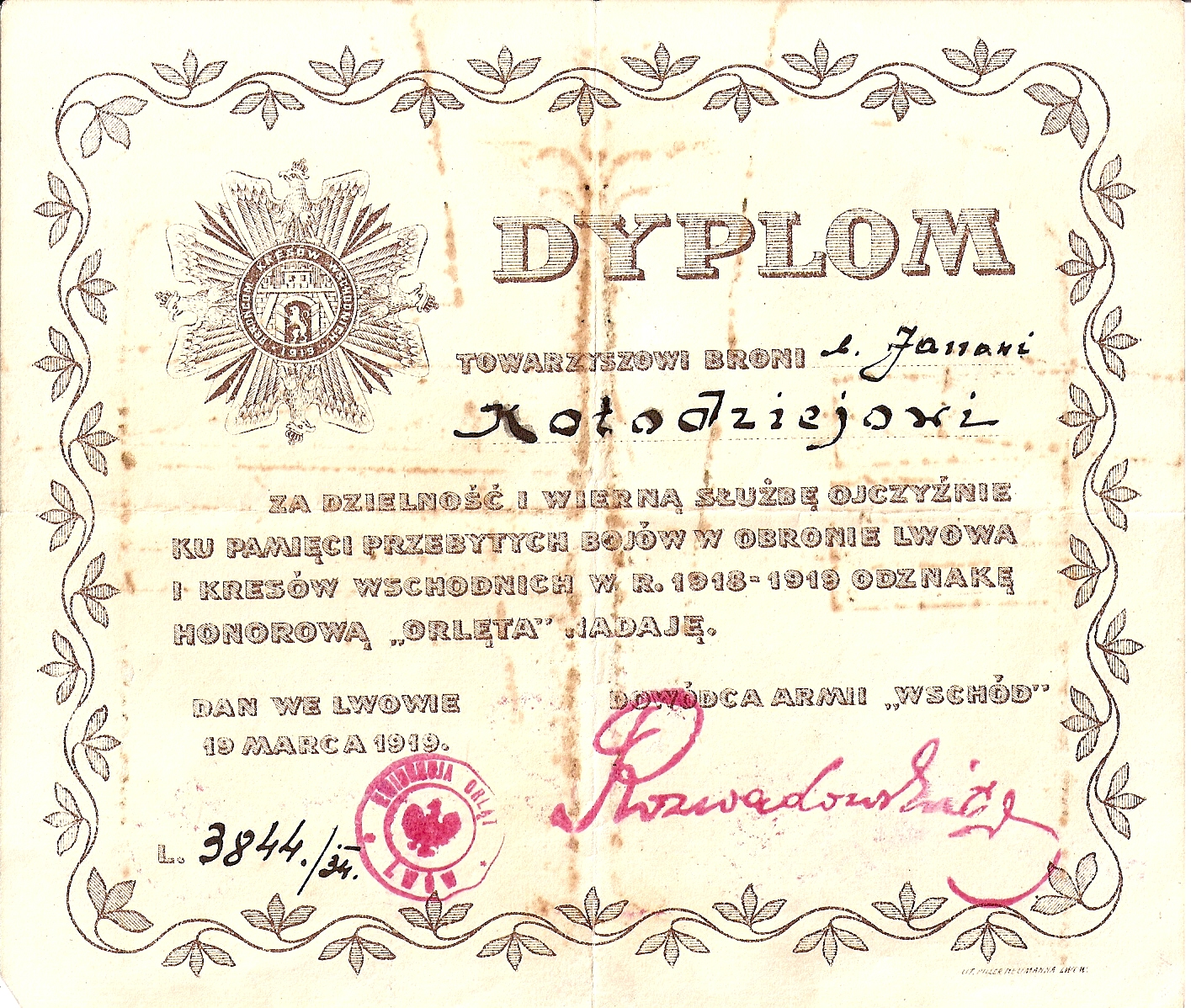 Dyplom Odznaki "Orlęta" nadanej Janowi Kołodziejowi za obronę Lwowa i Kresów Wschodnich w latach 1918-1919, nadaną przez Dowódcę Armii "Wschód", generała broni Tadeusza Rozwadowskiego